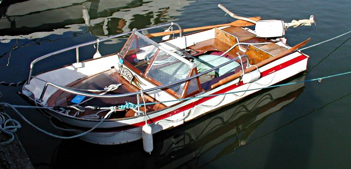 Pieni perämoottorivene laiturissa, Tapiolan Otsolahden venesatamassa.